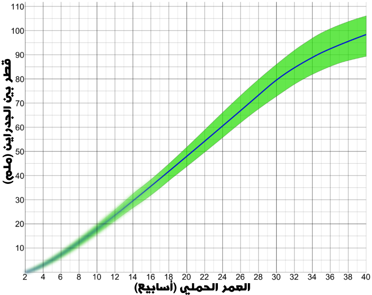 Biparietal diameter by gestational age ar